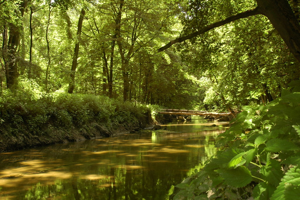 Rieka Myjava